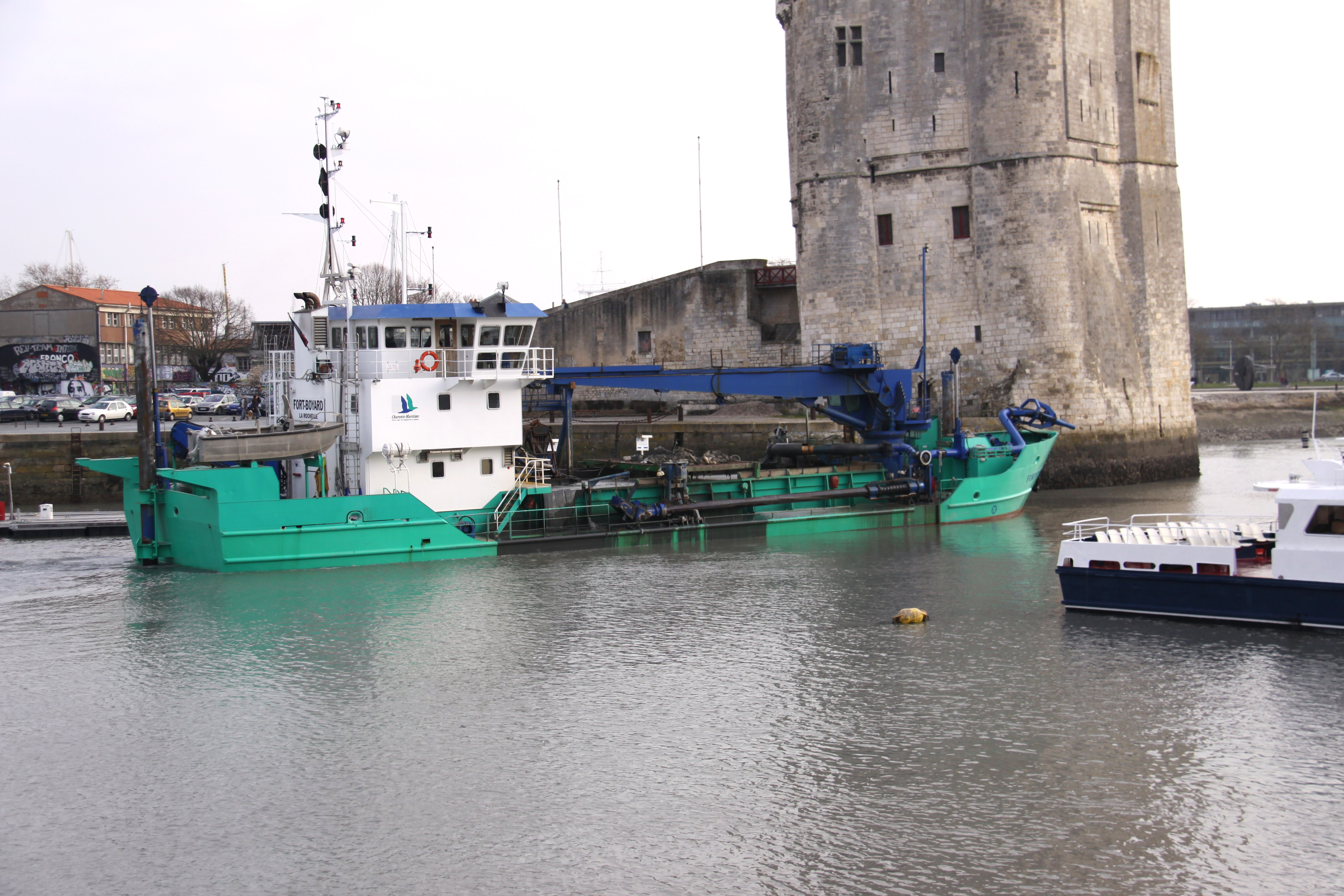 La drague aspiratrice à benne et à clapets "Fort-Boyard" effectuant des travaux de dragage dans le Bassin d' échouage du port de La Rochelle. Ce bateau a été construit en 2002 par le Chantier Merré à Nort-sur-Erdre. Il mesure 41,27 mètres de long et 10,50 mètres de large. Tirant d' eau: 3,16 mètres. La puissance totale de ses deux moteurs est de 634 kw. Sa coque est en métal. Port d' enregistrement: La Rochelle, IMO 9098347. La Rochelle, Charente Maritime, France.